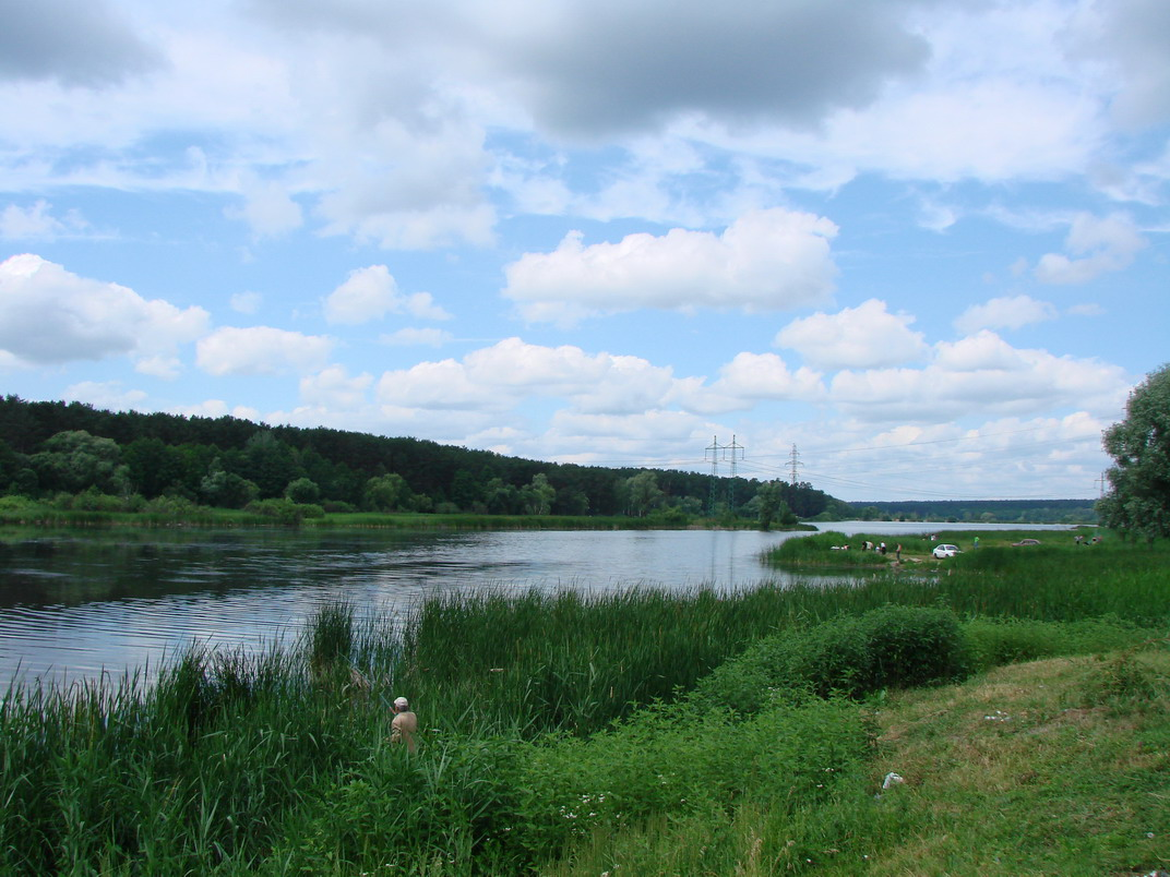 Річка Нивка: Річка в Києві та Київській області, права притока Ірпеня.